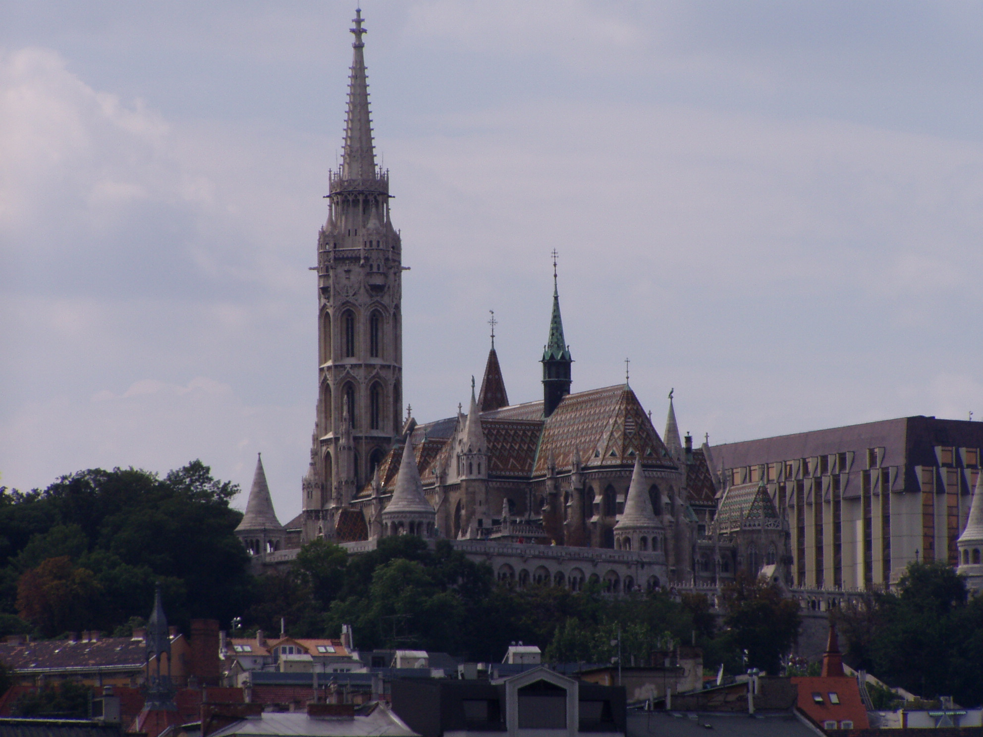 Kościół Macieja w Budapeszcie